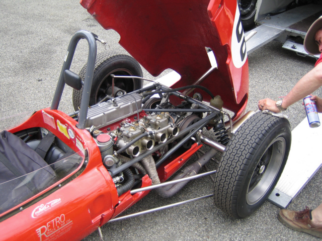 Lotus 20 engine details Pau GP 2007